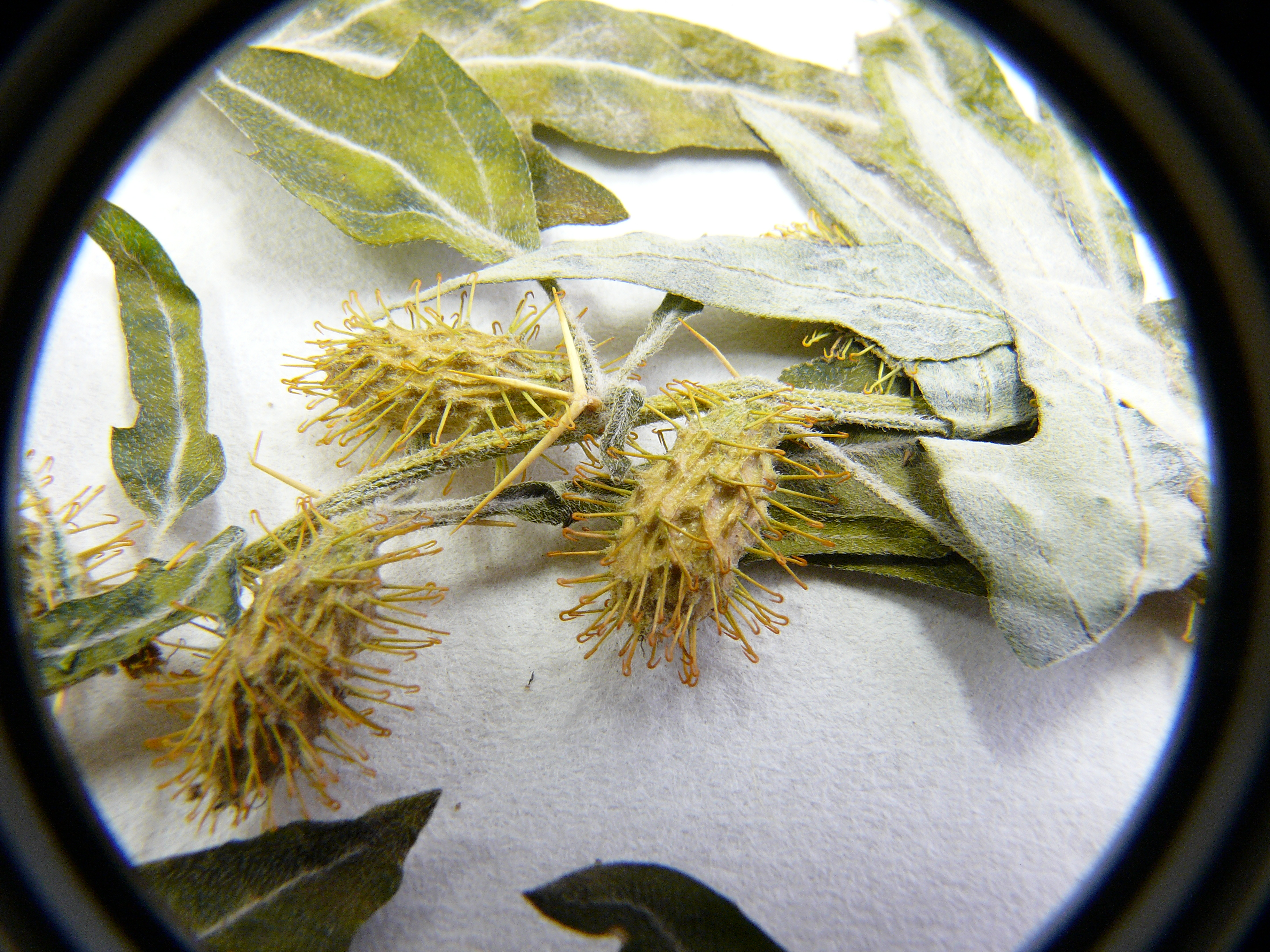 Semilla de Xanthium spinosum